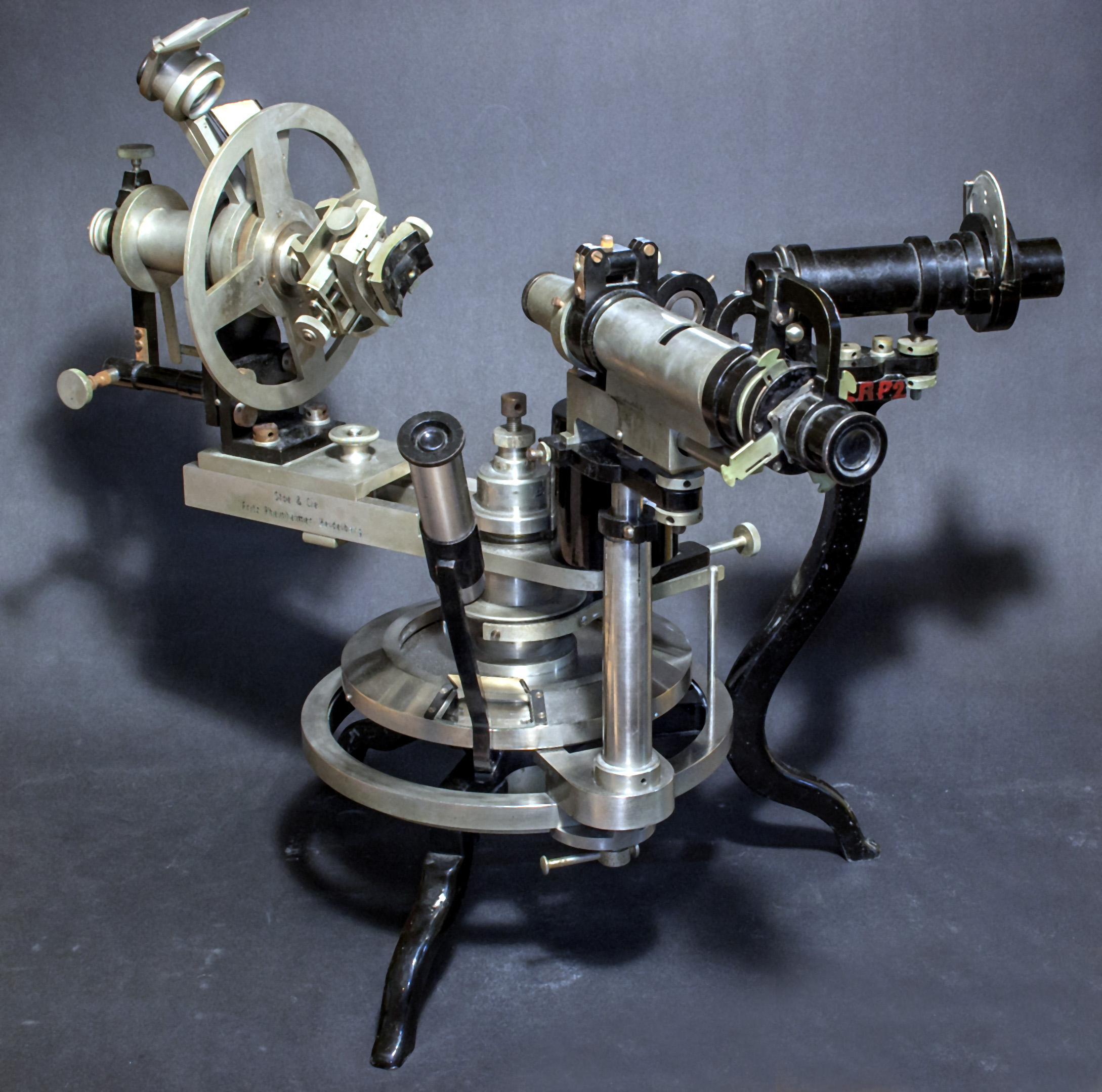 Ein Zweikreisgoniometer nach Goldschmidt (um 1925). Das Gerät befindet sich in Privatbesitz. Vielen Dank an Jürgen Philipp!